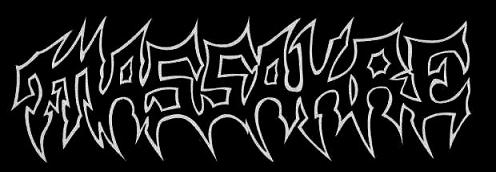 Banda de Thrash/Speed/Death Metal de Chile